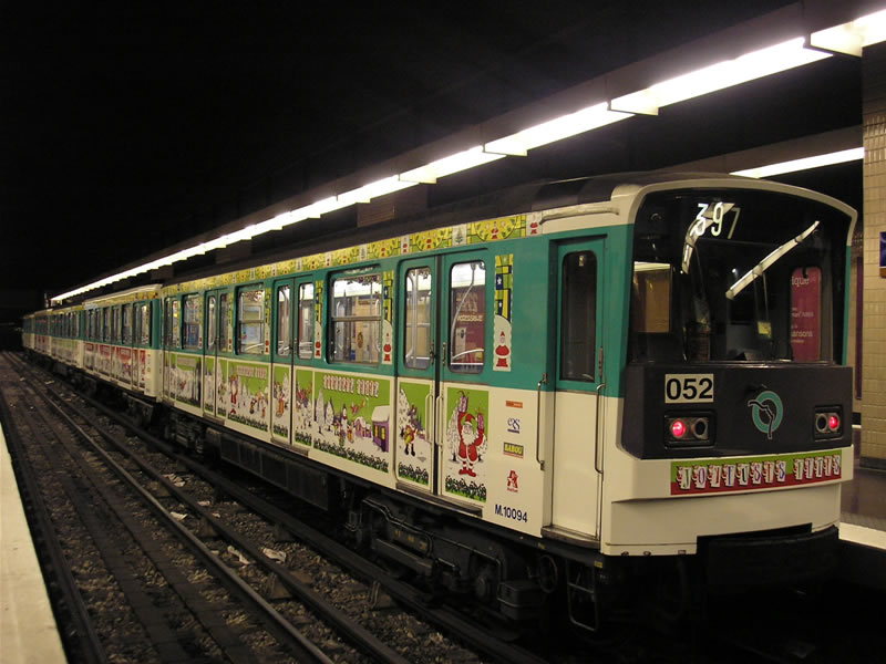 Tous les ans, la ligne 3 aménage une de ses rames en train de Noël.